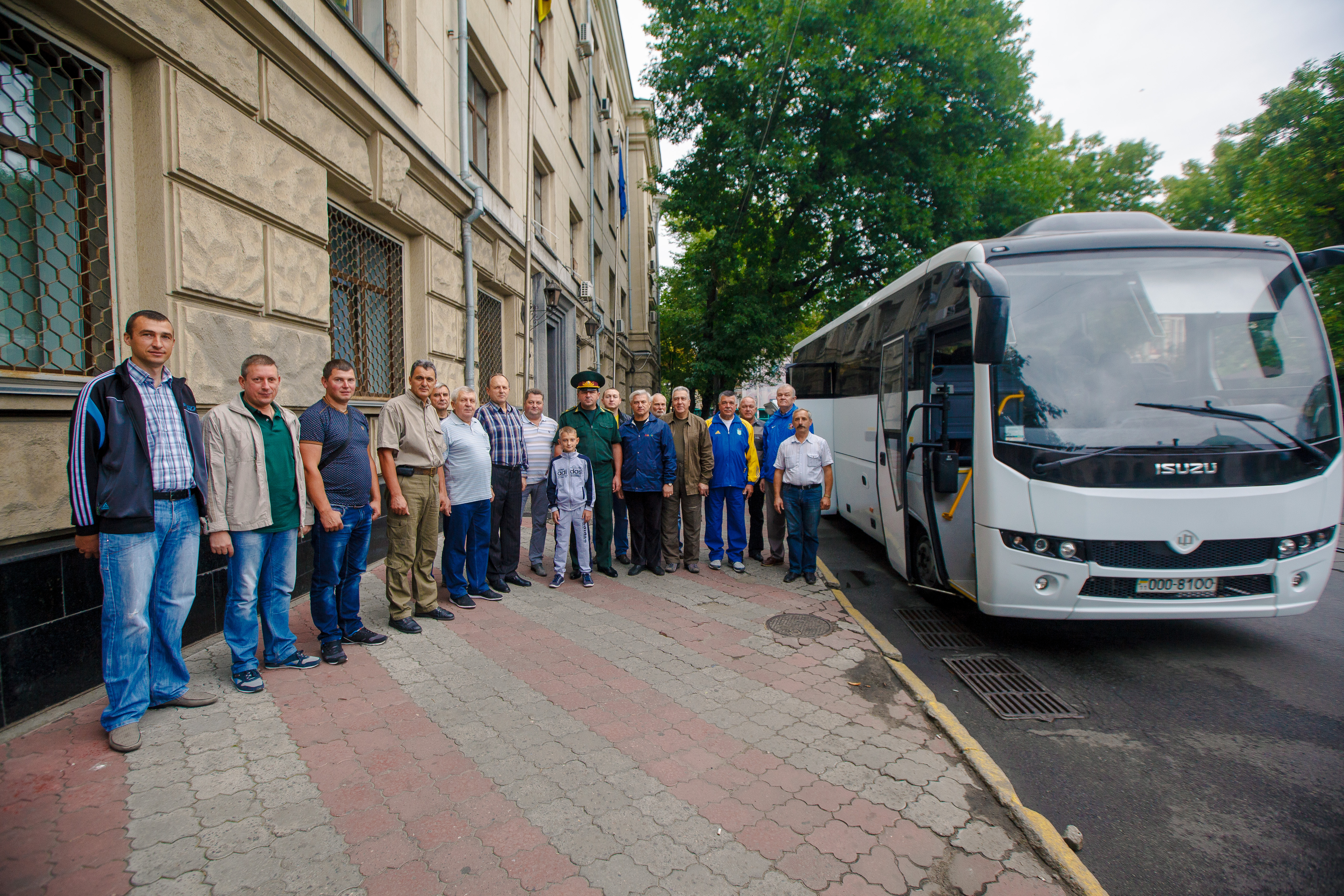 20150821-IMG_2837